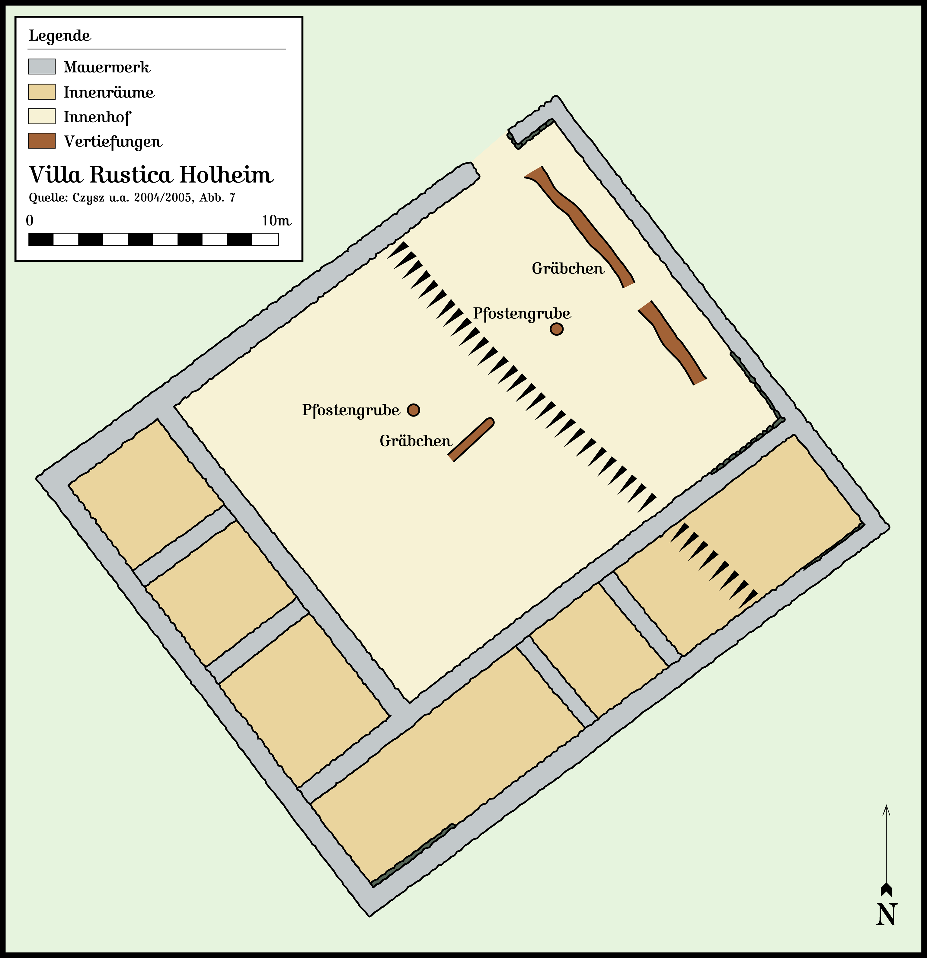 Haupthaus der Villa Rustica Holheim bei Nördlingen, Riesbecken, Bayern. Quelle: Czysz u.a. 2004/2005, Abb. 7.